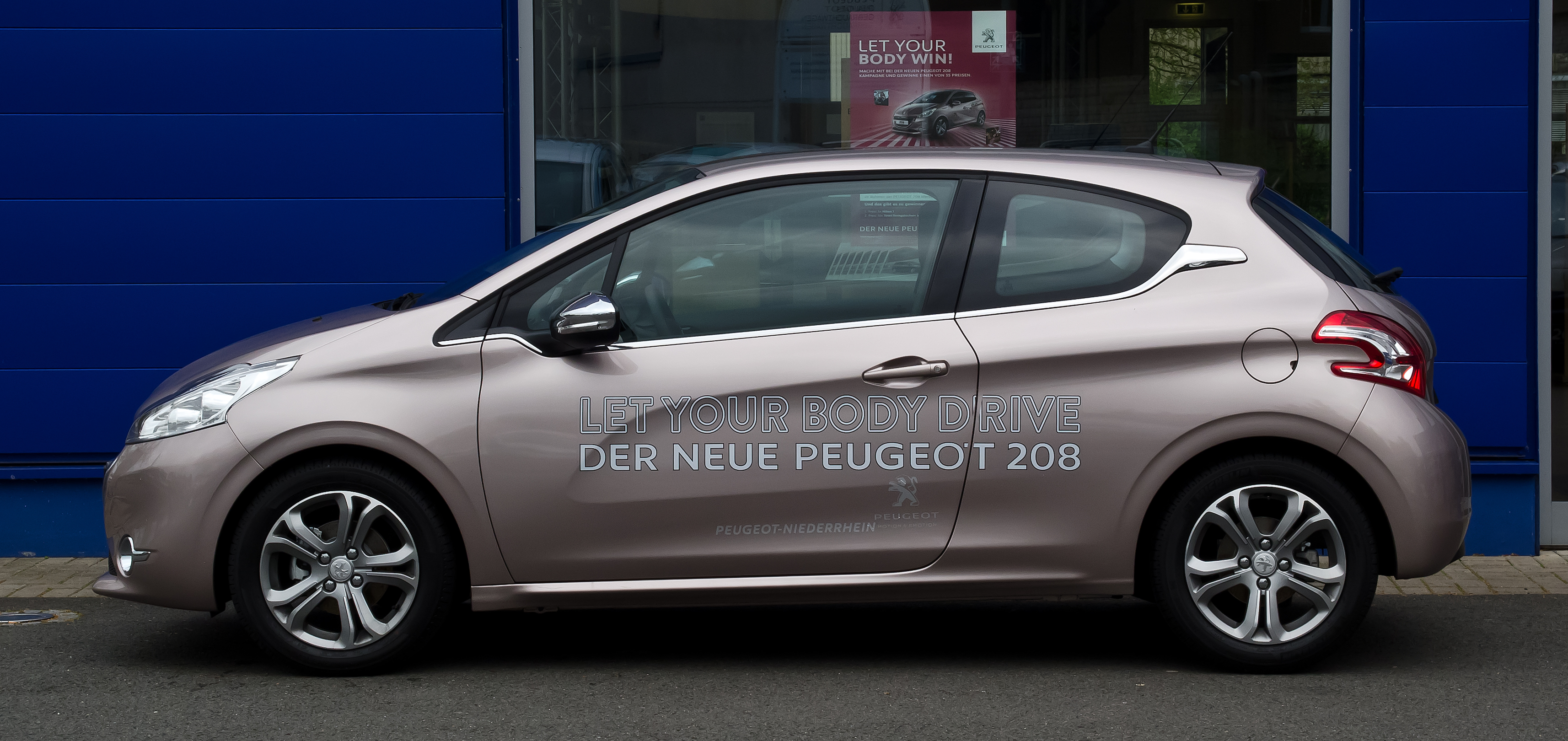 Peugeot 208 95 VTi Allure